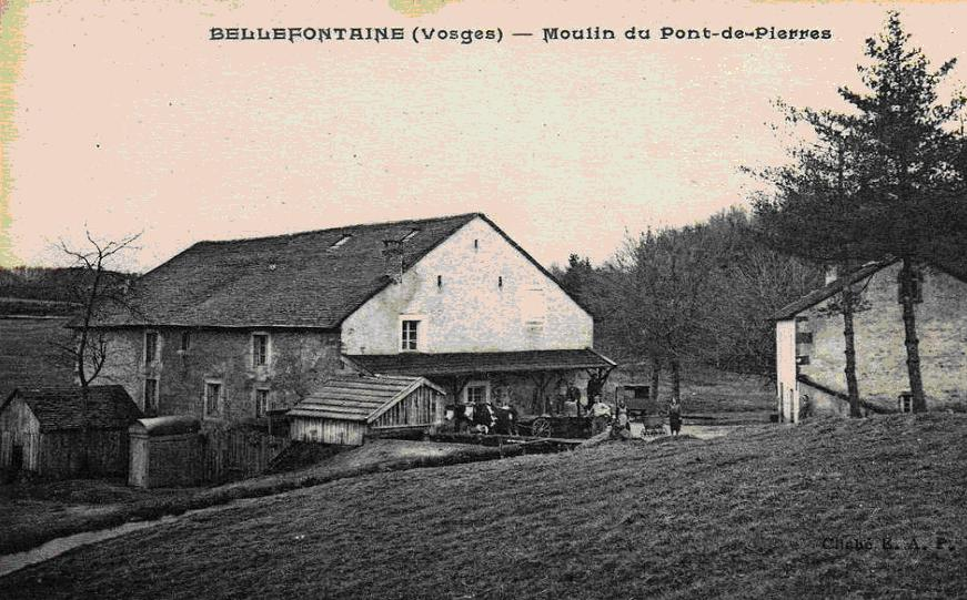 CPA Bellefontaine (88) - Moulin du Pont de Pierre